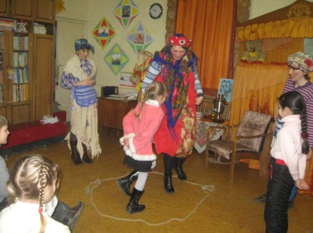 Семейный клуб выходного дня «Маленькая страна»